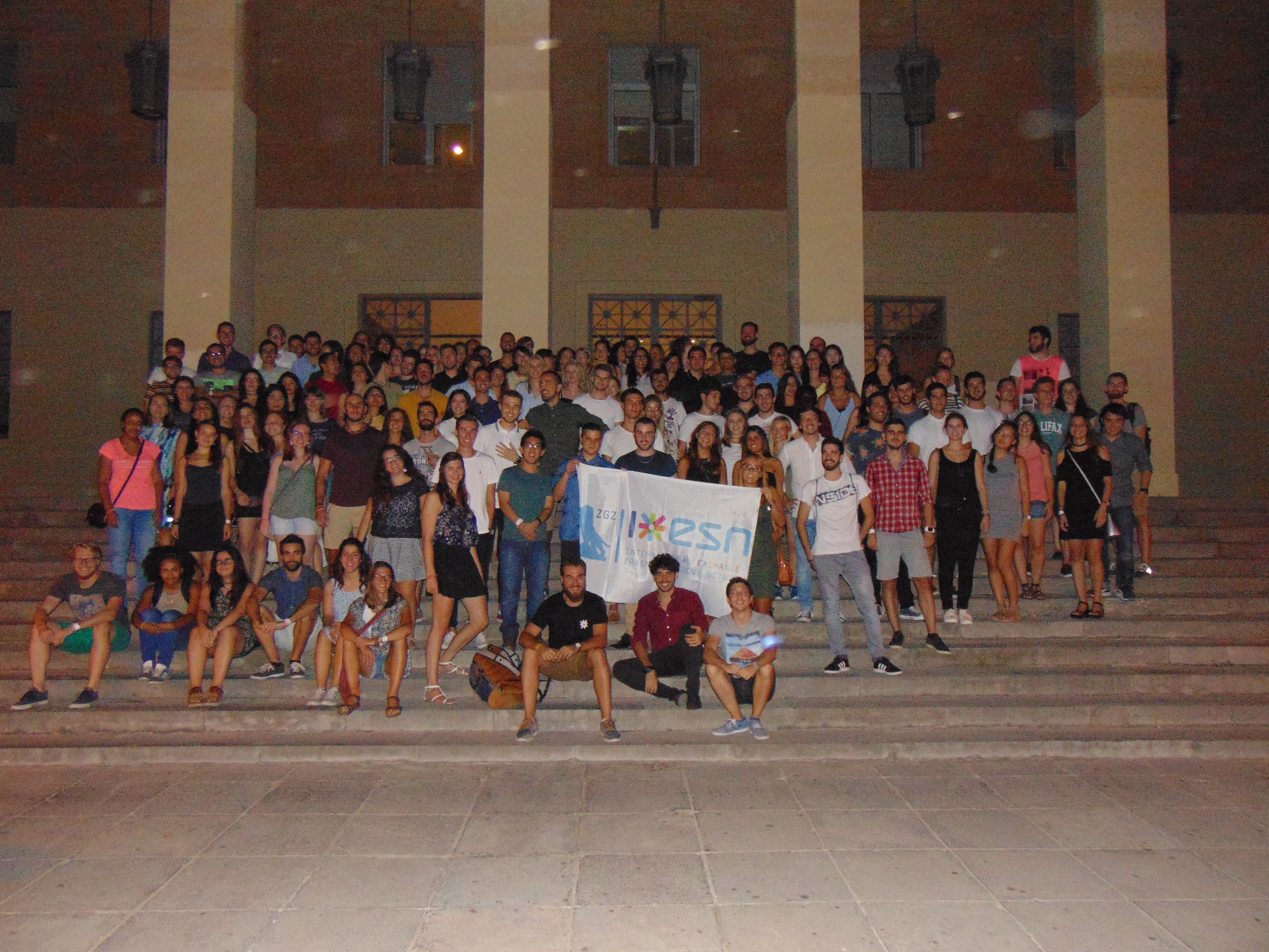 Grupo Erasmus de la asociación ESN en las escalinatas de la Facultad de Derecho de la Universidad de Zaragoza (Septiembre de 2016).